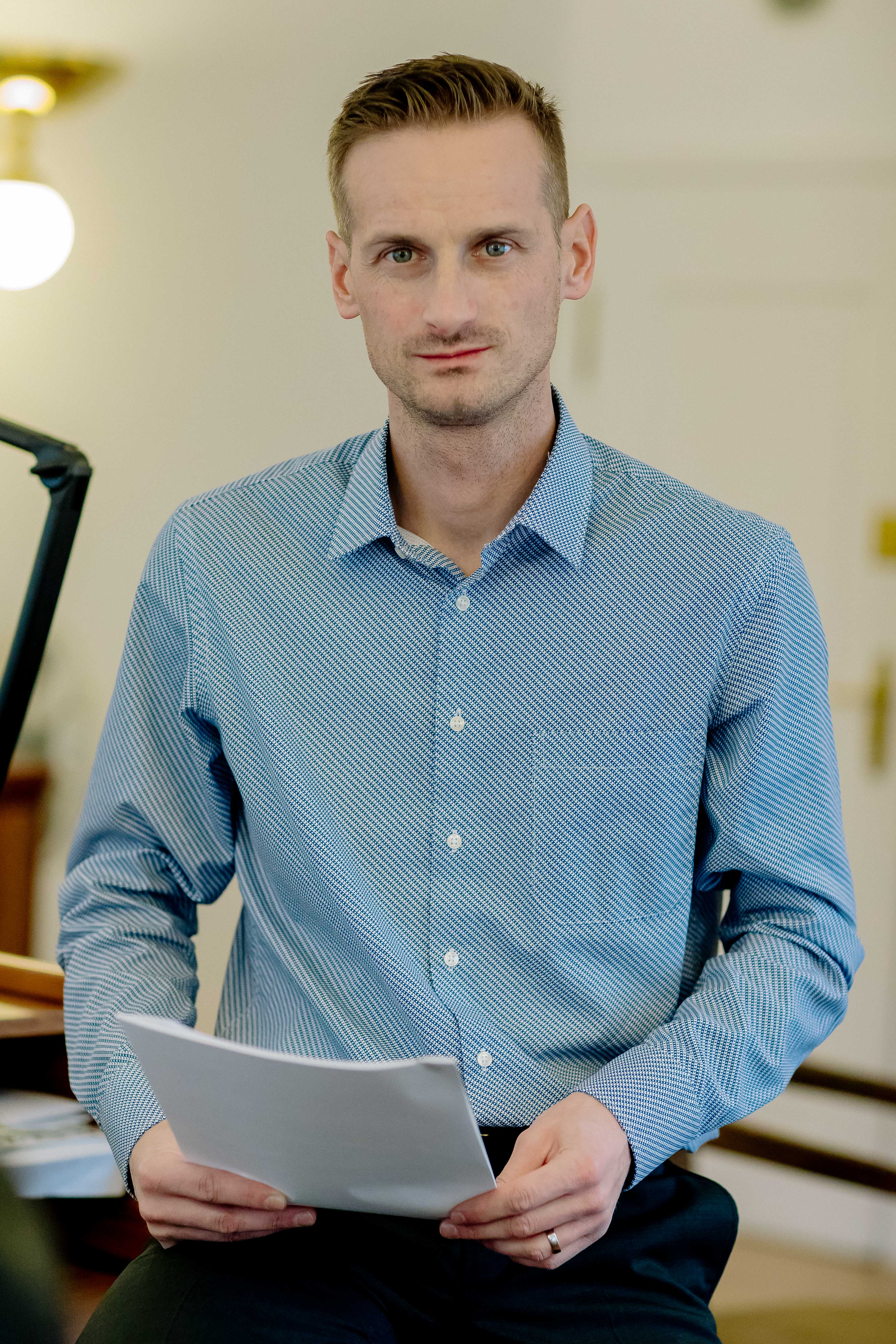 Poslanec Jakub Janda po zvolení do Parlamentu v listopadu 2017